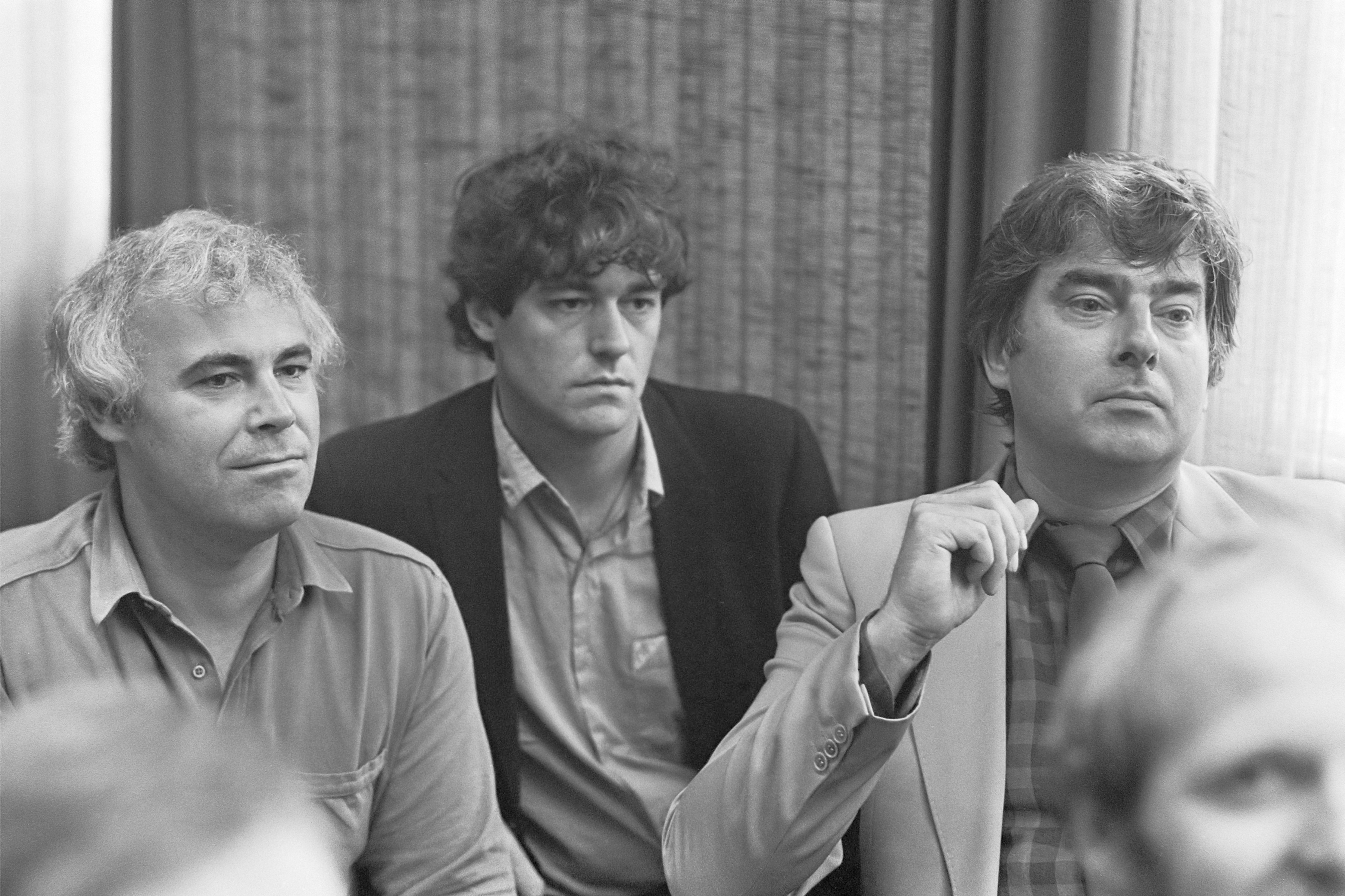 Kort geding over het opheffen van actualiteitenrubriek "Achter het Nieuws" tegen het VARA-bestuur. V.l.n.r. Redacteur Henk van Hoorn, dhr. Jan van Loenen en eindredacteur Joop van Zijl 2 september 1983